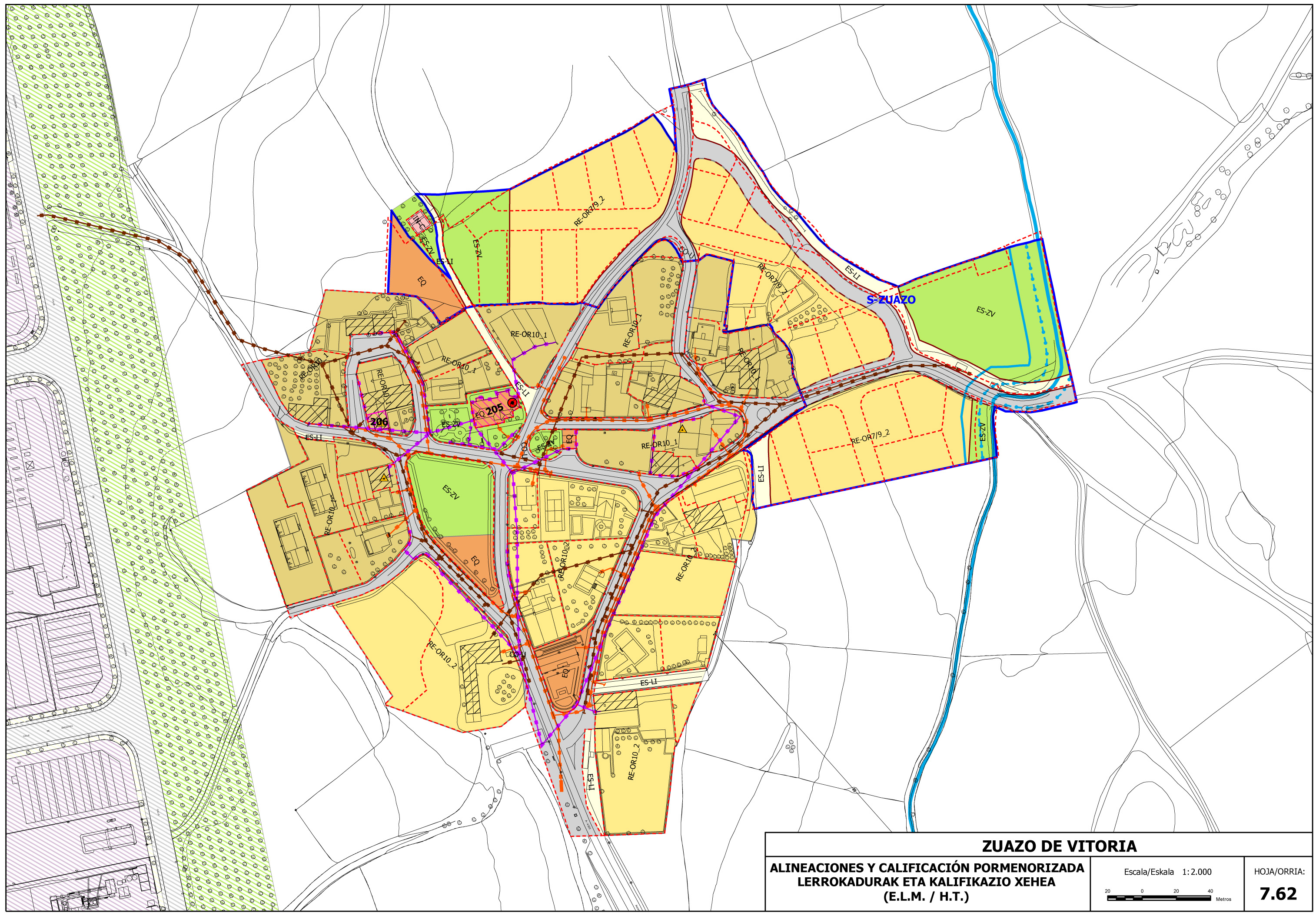 Zuhatzu (Gasteiz), 31-12-31n.